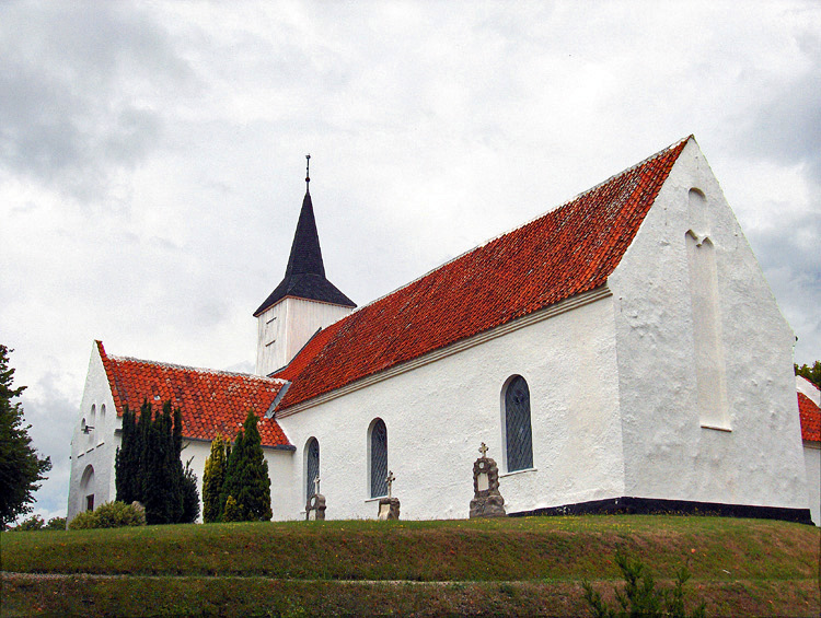 fra sydøst